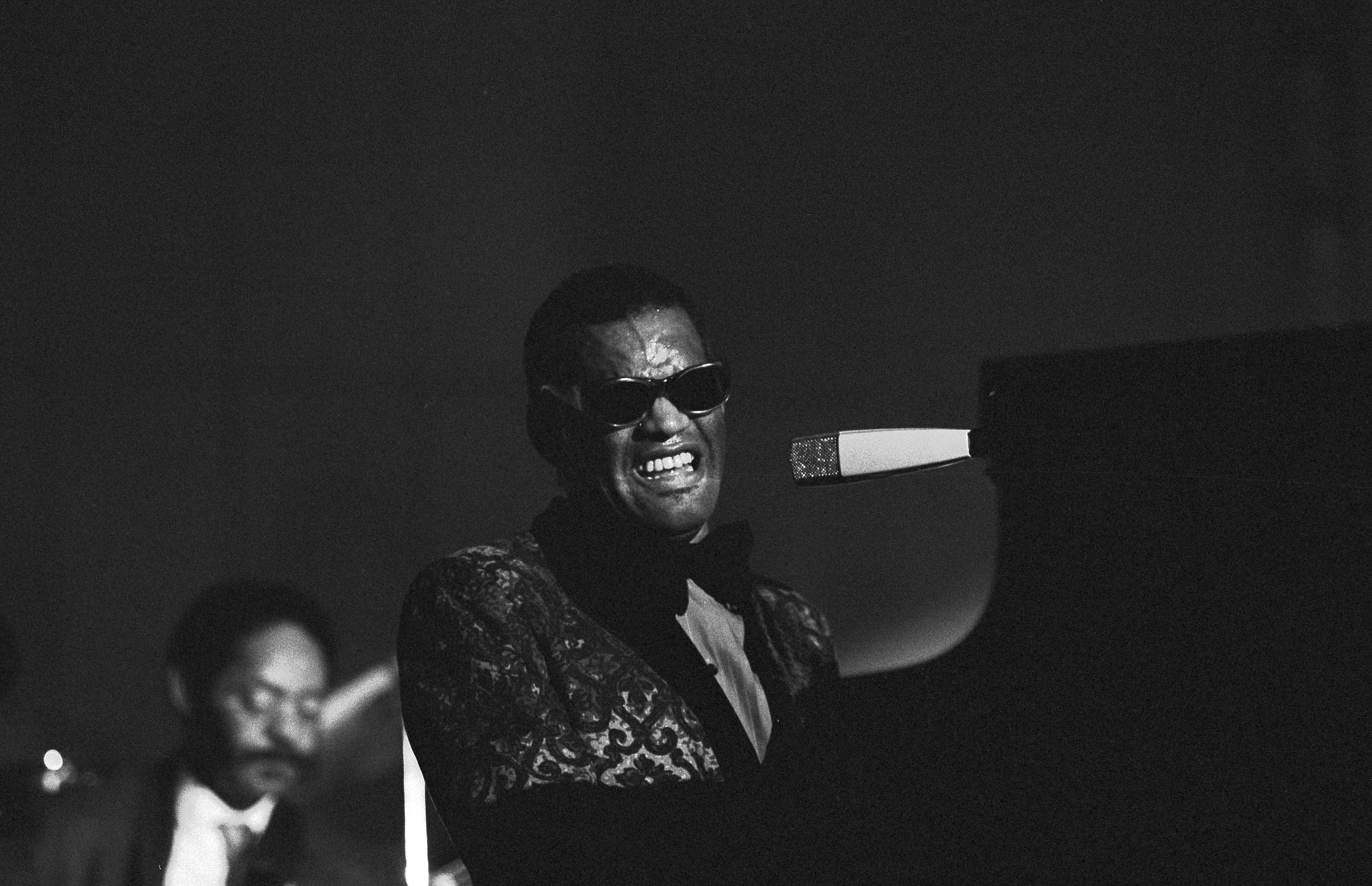 Ray Charles in der Hamburger Musikhalle, September 1971